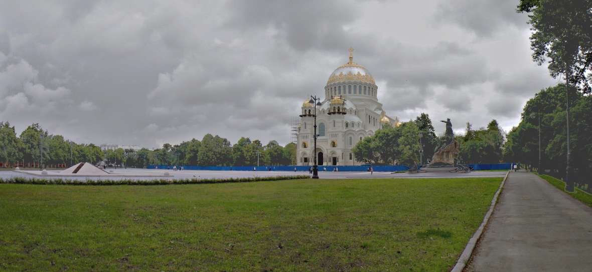 Anchor square.Kronstadt.